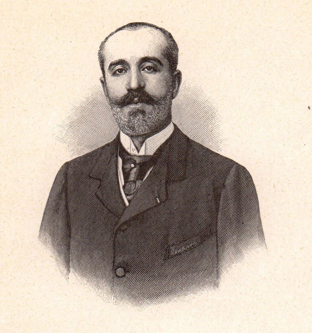 French industrialist Henry Deutsch de la Meurthe (1846-1919)